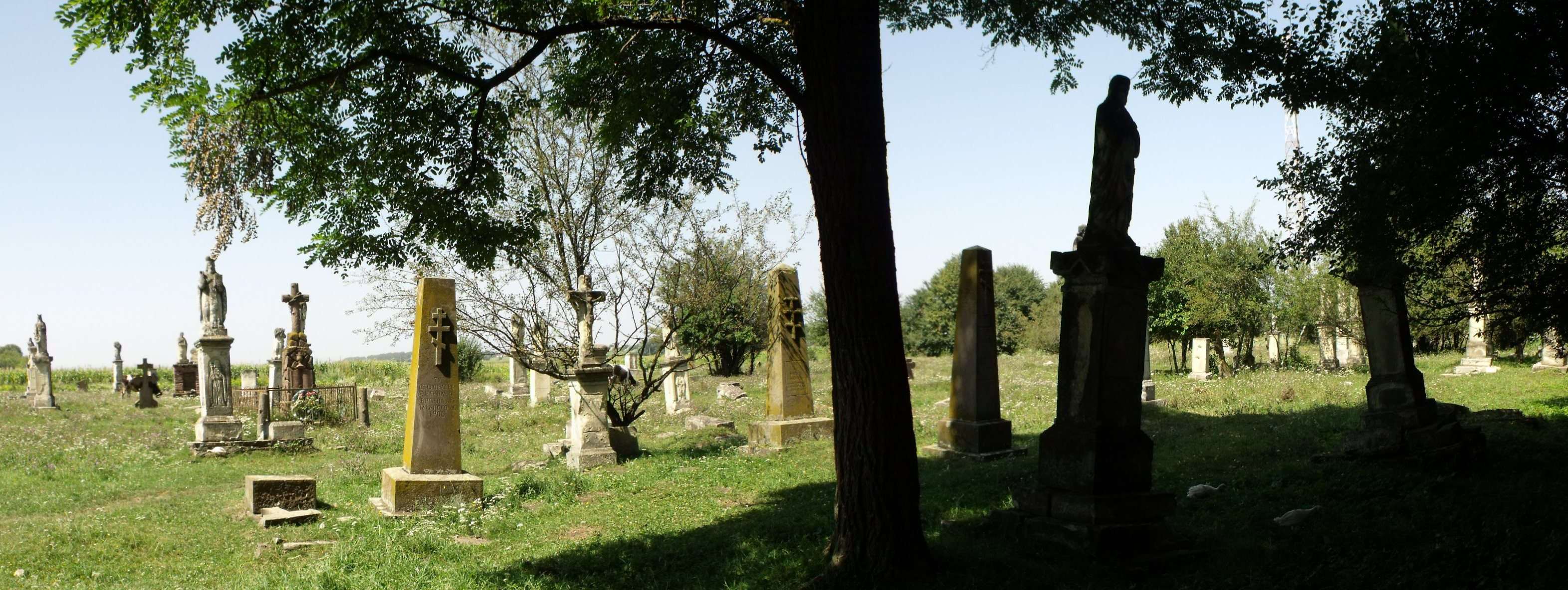 старий цвинтар